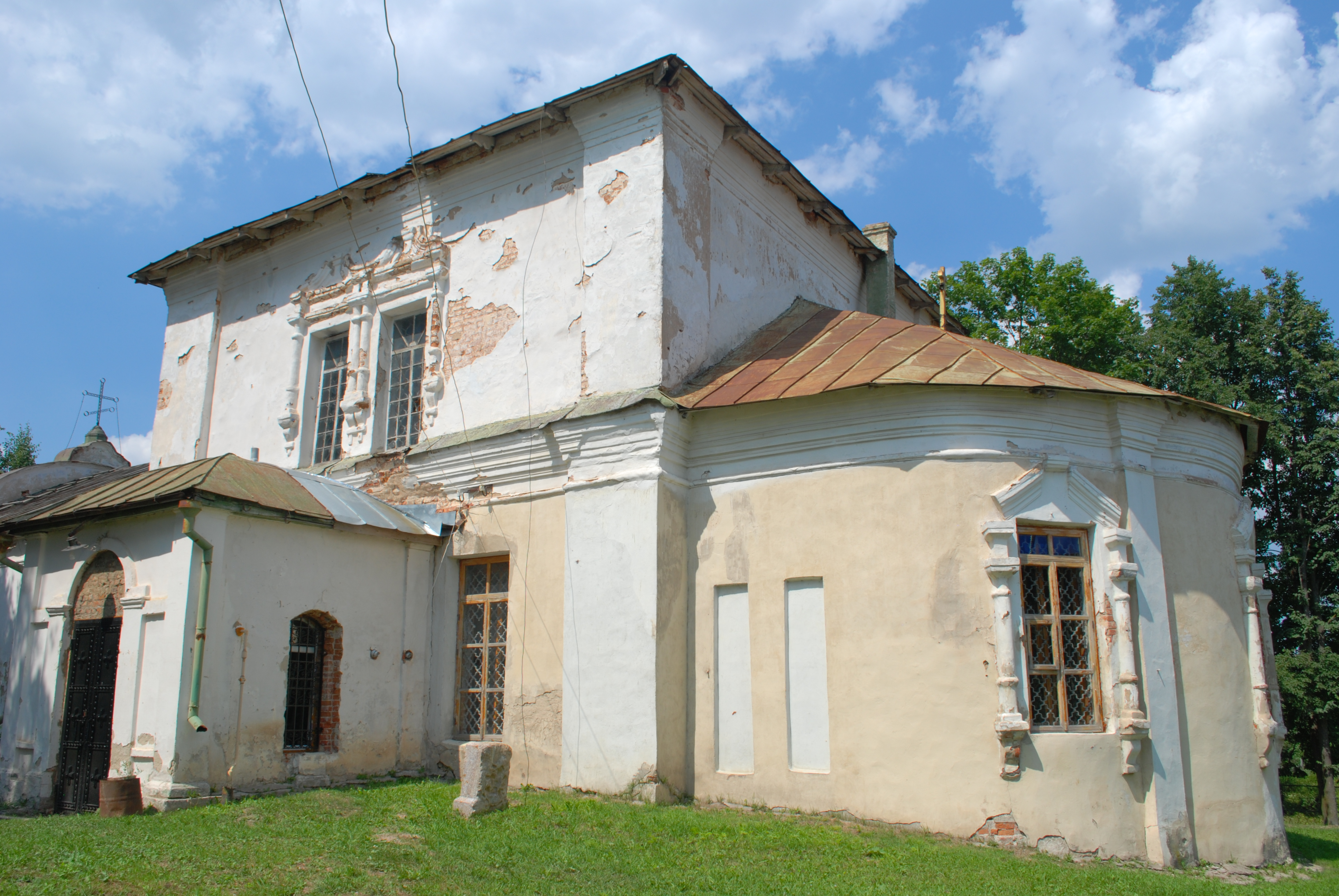 Благовещенская церковь (Калужская область, Мещовск, улица Энгельса, 4)